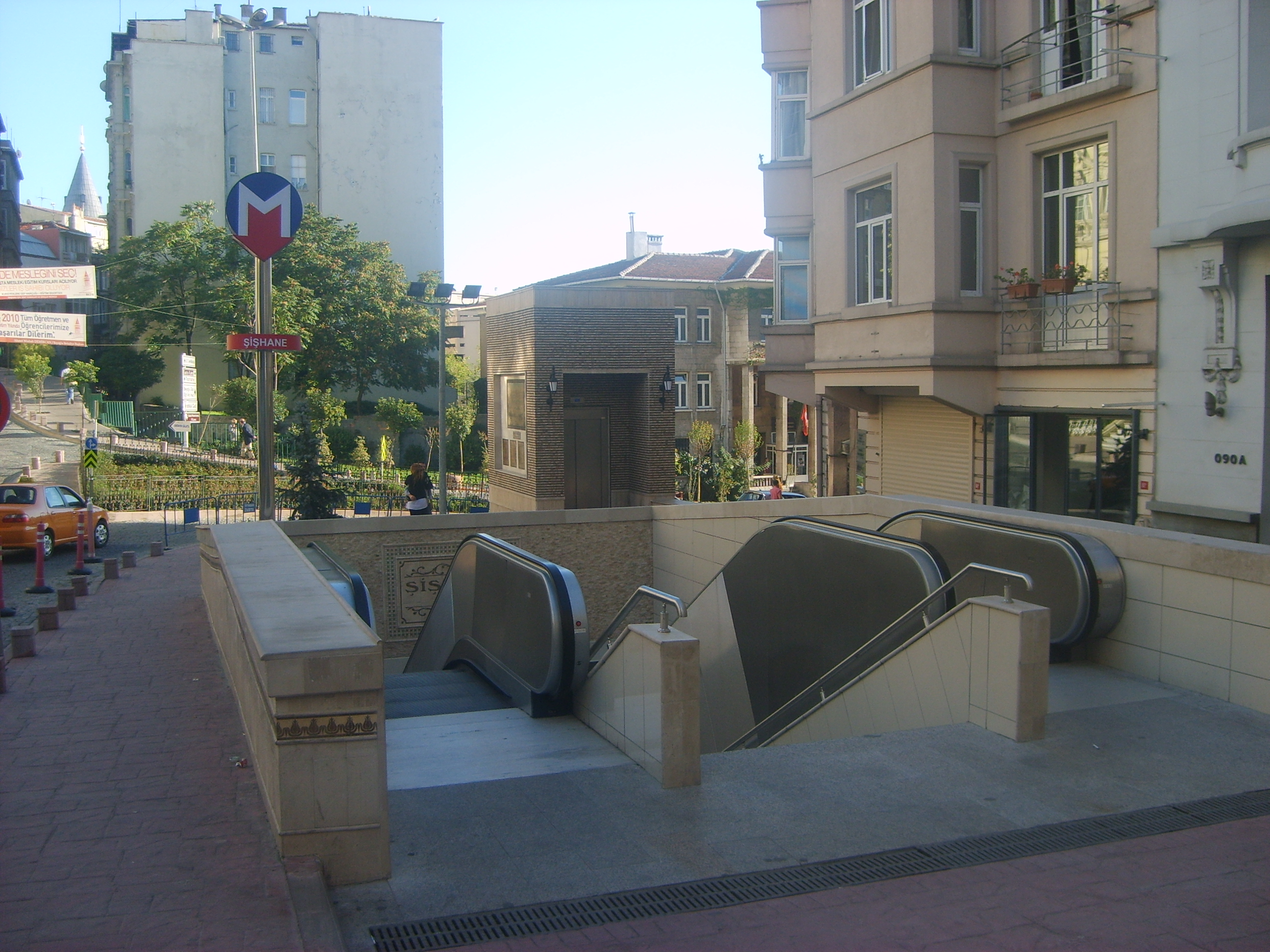 İstanbul metrosu, Şişhane istasyonu 6.Daire Girişi